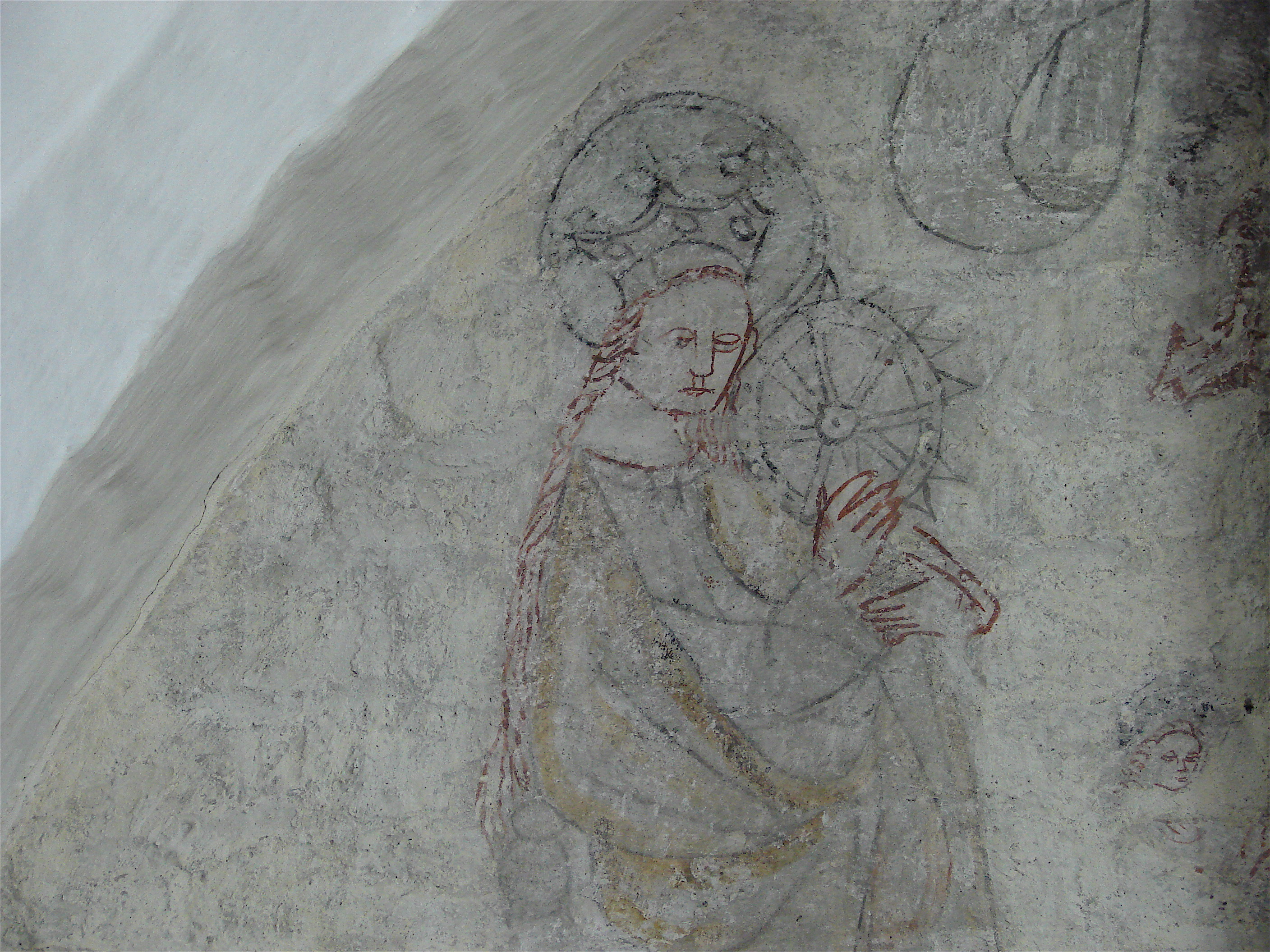 Sankt Ursula Kirke, Ivö, Ifø, kalkmaleri, mural painting, Saint Catherine of Alexandria